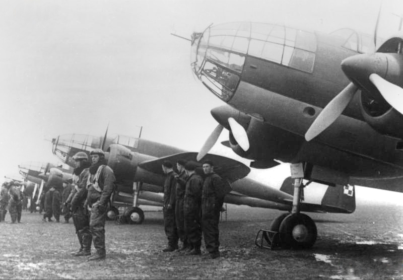 Samoloty PZL.37 Łoś wraz z załogami.